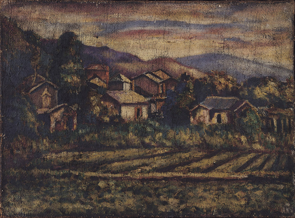 李梅樹作品：寧靜的村落 ，1927，油彩 麻布袋。李梅樹運用父親米店的麻布袋來畫，算是克難的。前景是田埂階、中景為村落、遠景為山和雲，風格承習於『石川欽一郎』老師。